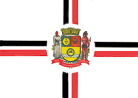 Bandeira de Itaquaquecetuba